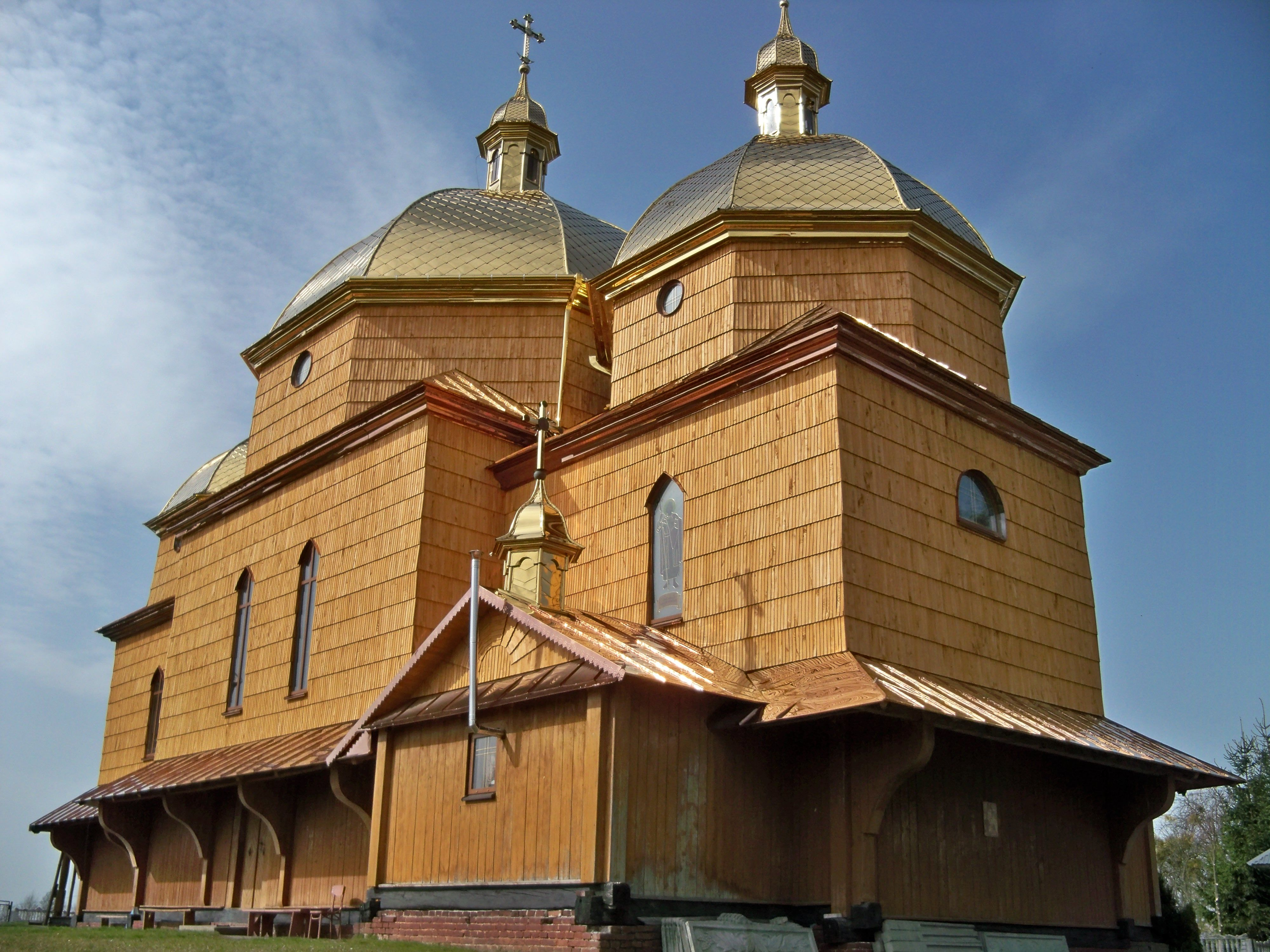 Церква Преображення Господнього /дер./, с.Двірці